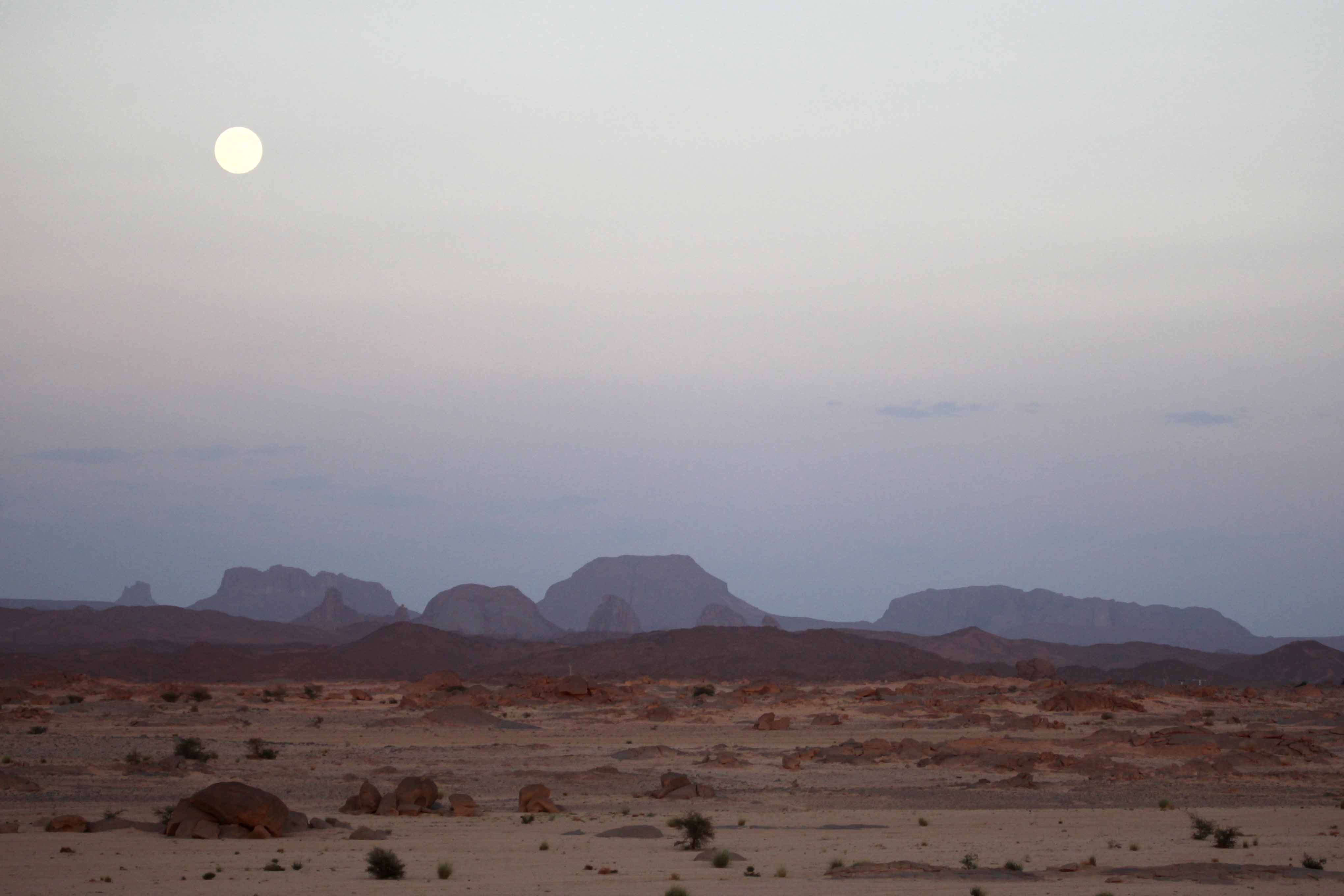 Hoggar Tamanrasset 2010 : Assekrem signifie en langue touareg "la fin du monde".